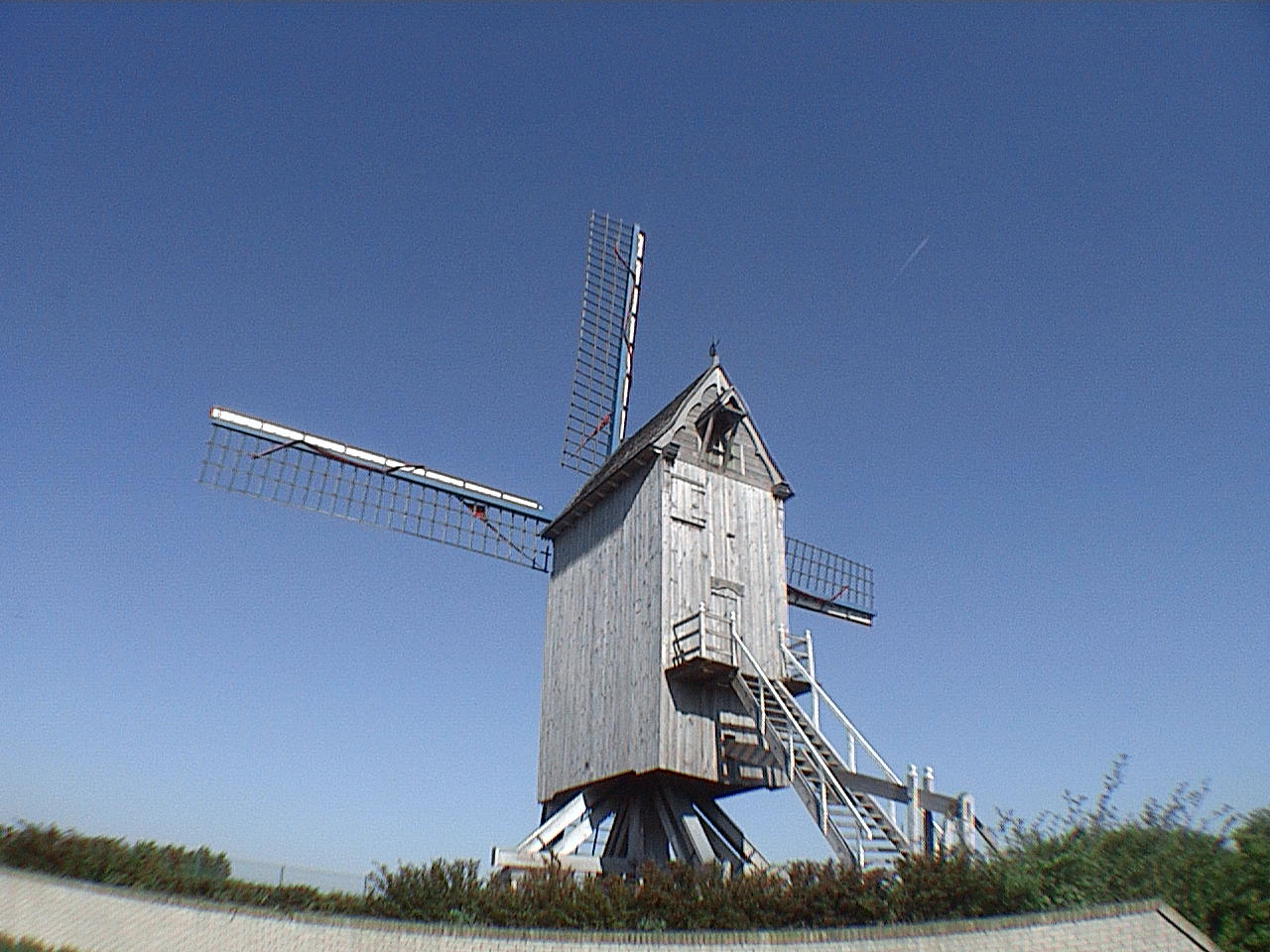 Moulin à vent le Spinnewyn d'Hondschoote